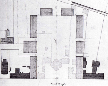 Plan for Karlsruhe marketplace by Peter Burdett. "Plan zum Karlsruher Marktplatz von P.P. Burdett. Kopie aus dem Jahre 1787, Generallandesarchiv Karlsruhe"